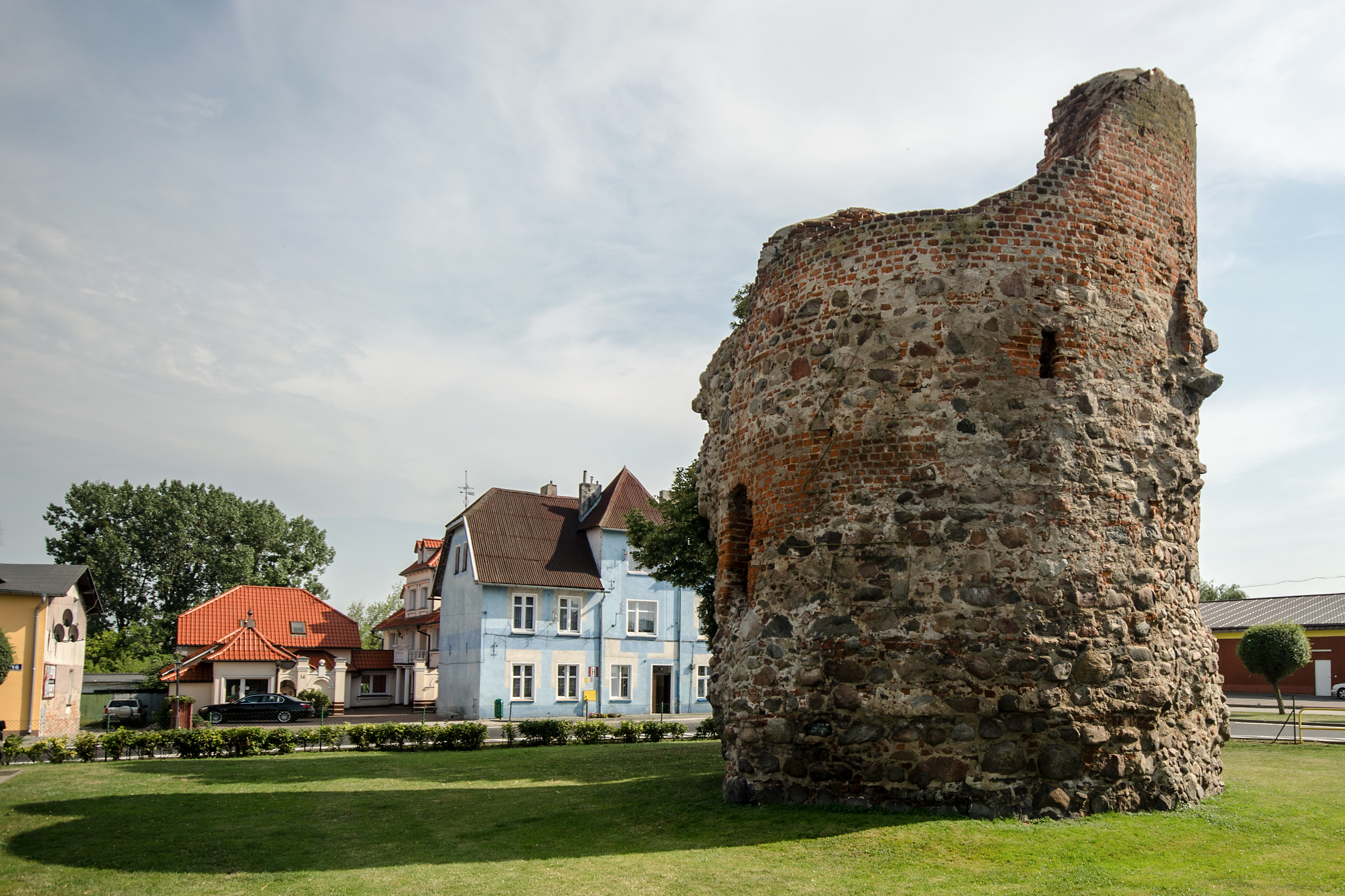 Kowalewo Pomorskie - mury miejskie, XIV (baszta)